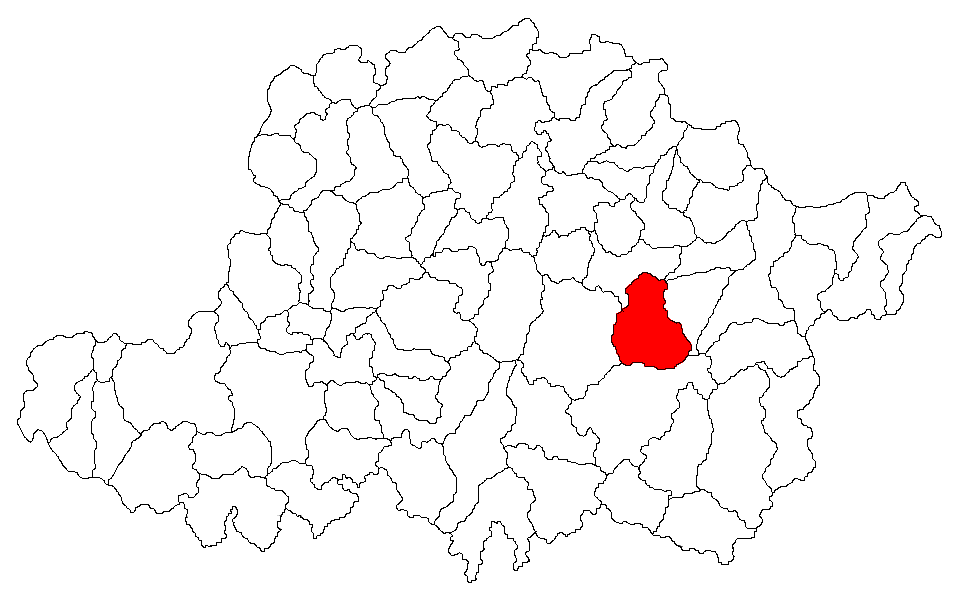 Categorie:Hărţi ale judeţului Arad